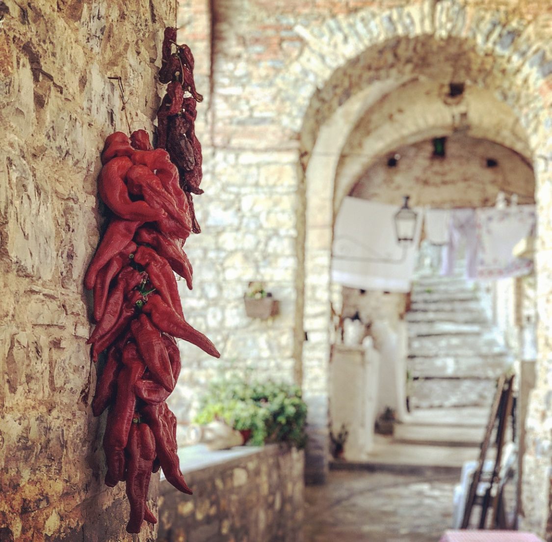 Lamie di Bitonte This is a photo of a monument which is part of cultural heritage of Italy.